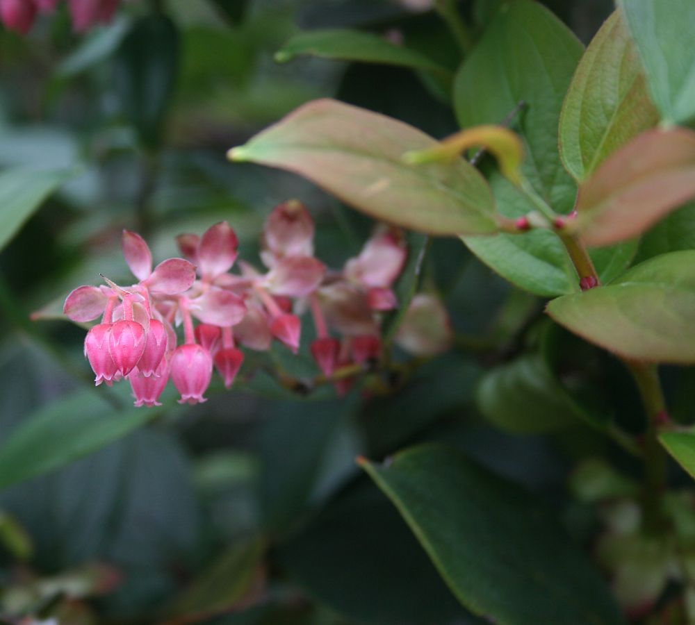 Gaultheria erecta, Heidekrautgewächse (Ericaceae) - Costa Rica: Prov. Alajuela, Parque Nacional Volcán Poás, 2550-2600 m